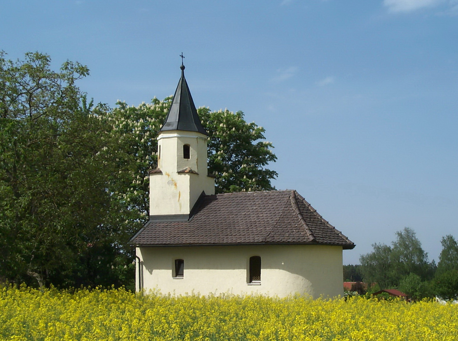 Haidersberg 14. Kapellenbau, 2. Hälfte 17. Jh.